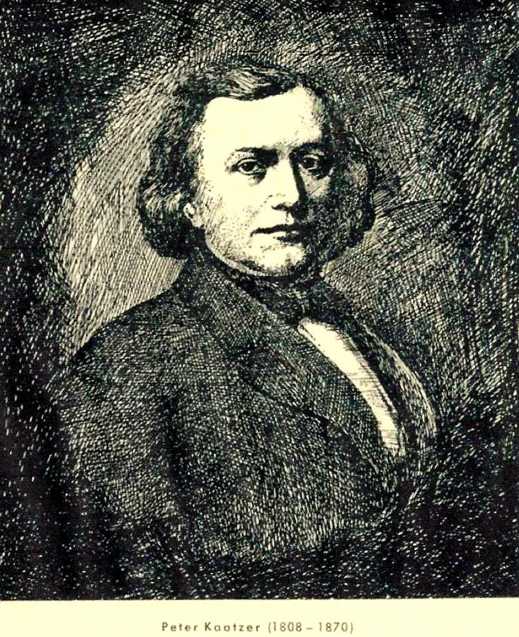 Porträt des Buchhändlers Peter Kaatzer, Aachen